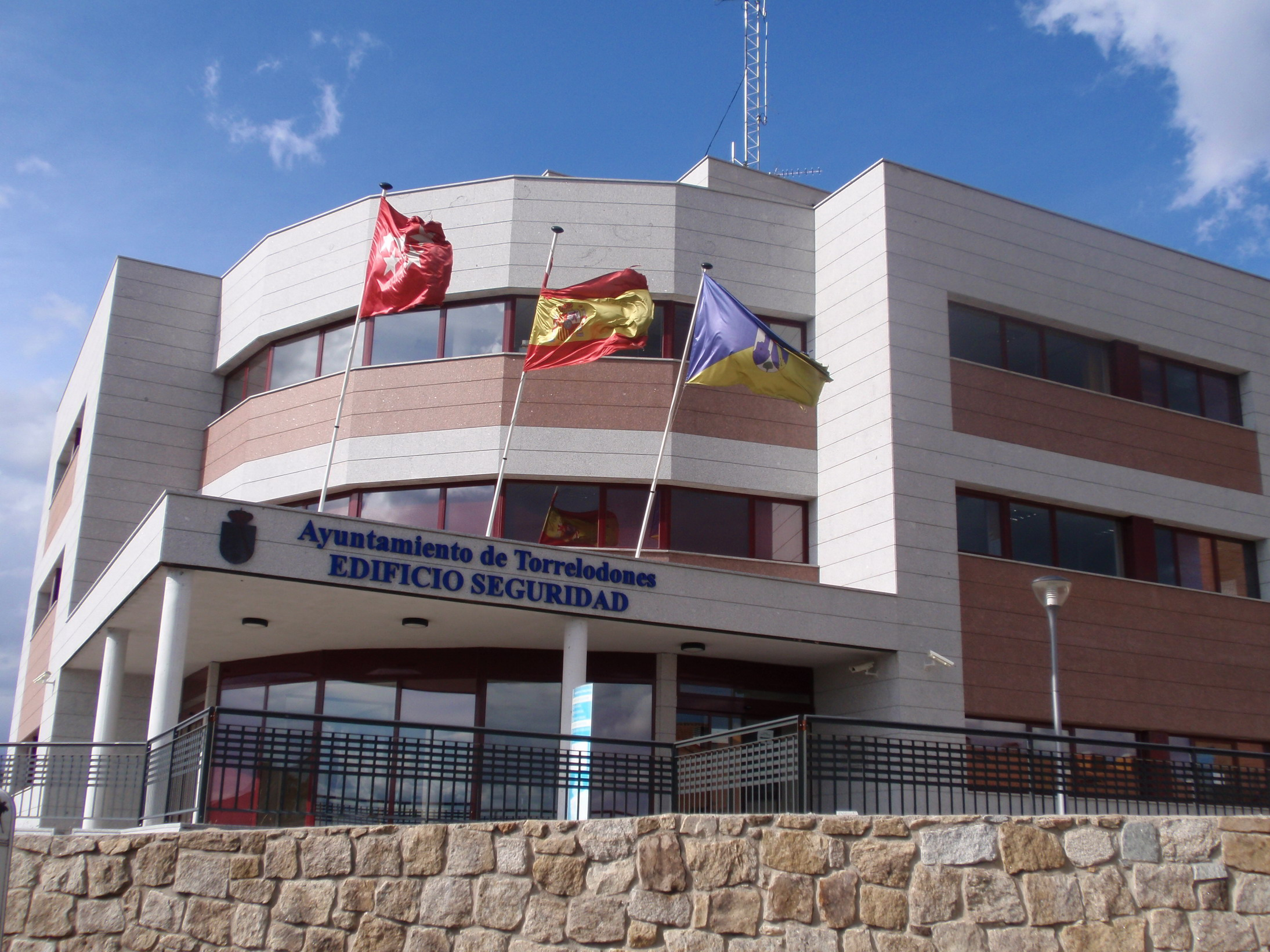 Torrelodones. Edificio Seguridad.